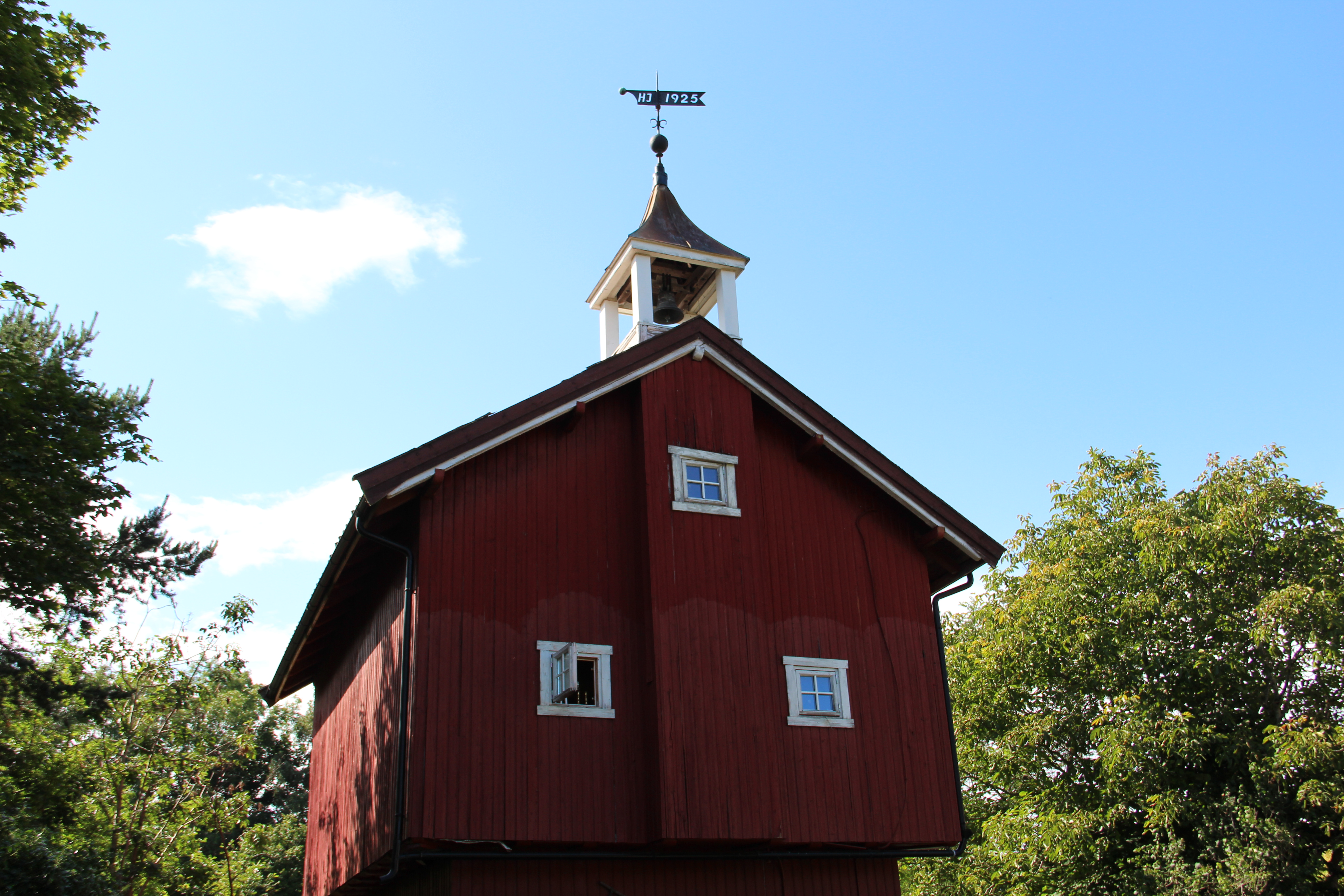 Stabburet